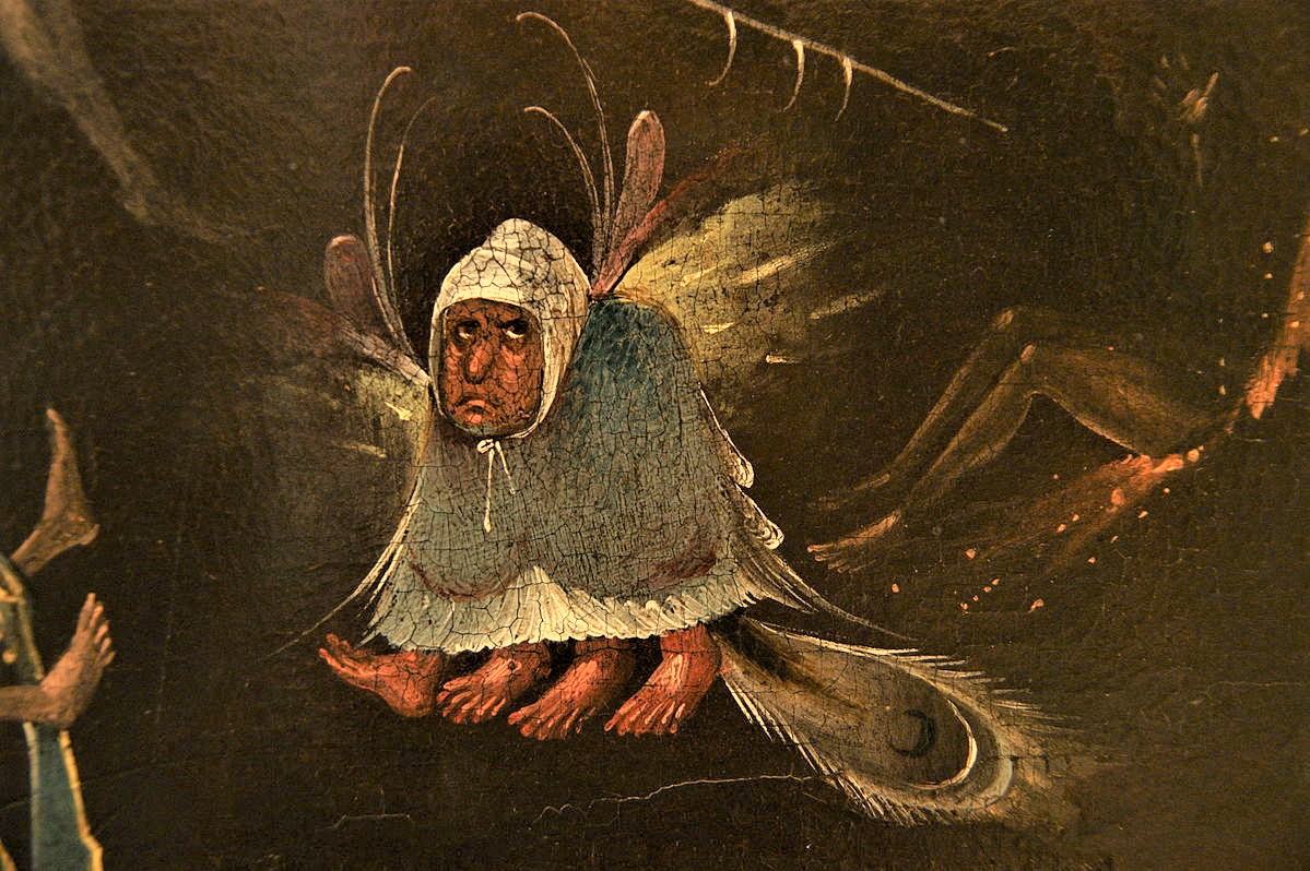 2009-02-15 München 068 Alte Pinakothek, Hieronymus Bosch - Fragment eines Jüngsten Gerichts, Detail